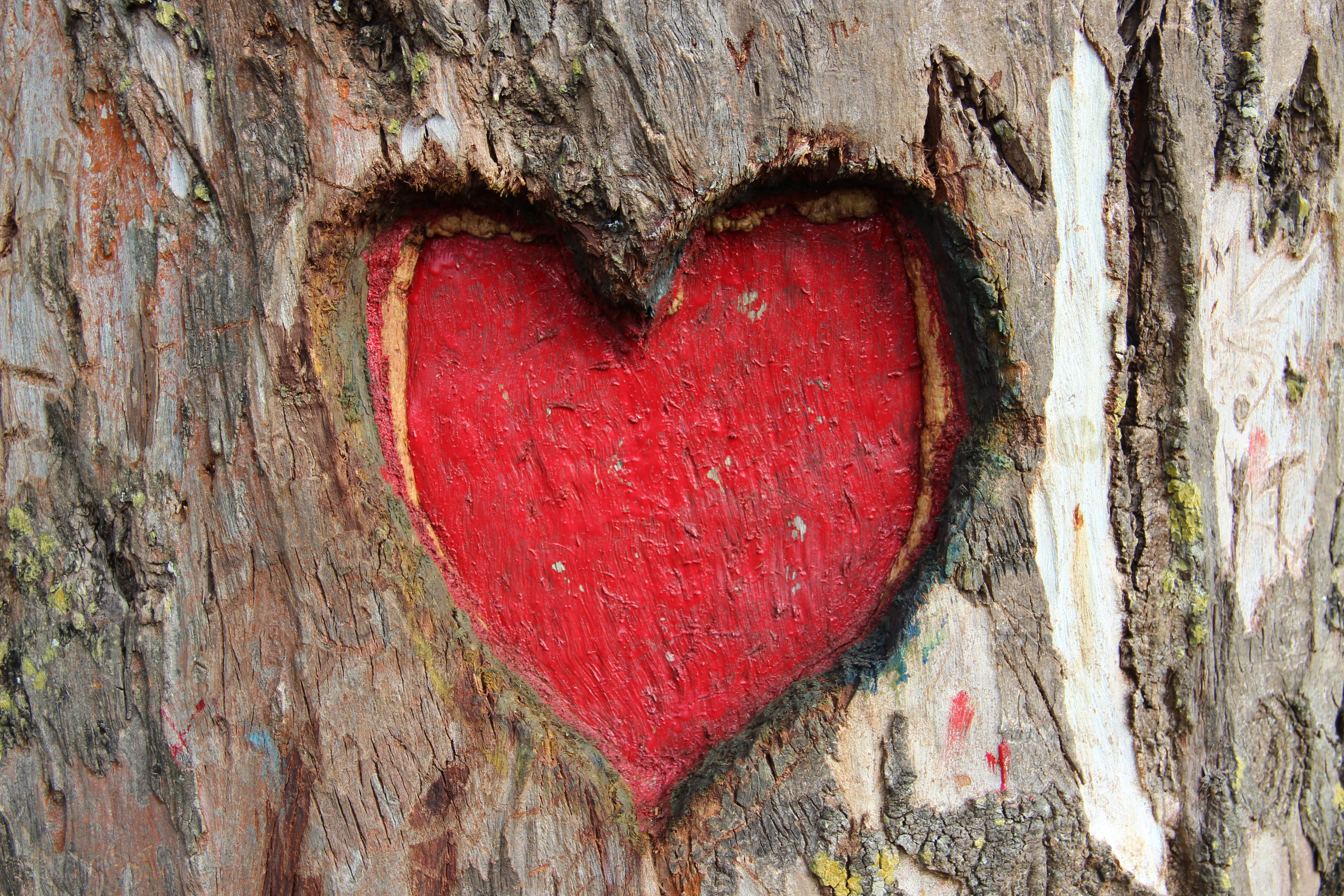 ஏற்காட்டில் மரத்தில் ஒரு காதல் சின்னம், தமிழ்நாடு, இந்திய ஒன்றியம். This photo has been taken in the country: India